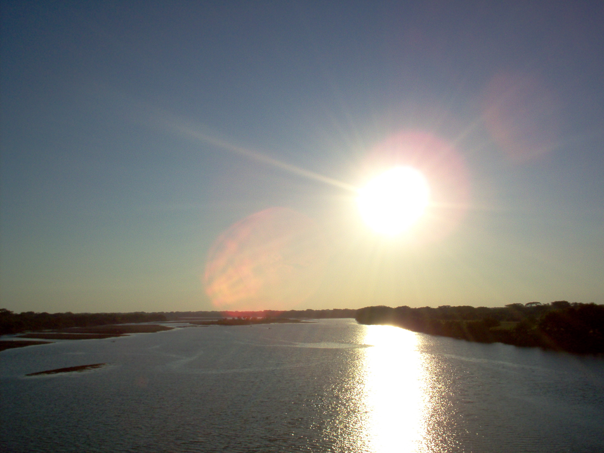 En su inexorable camino al mar